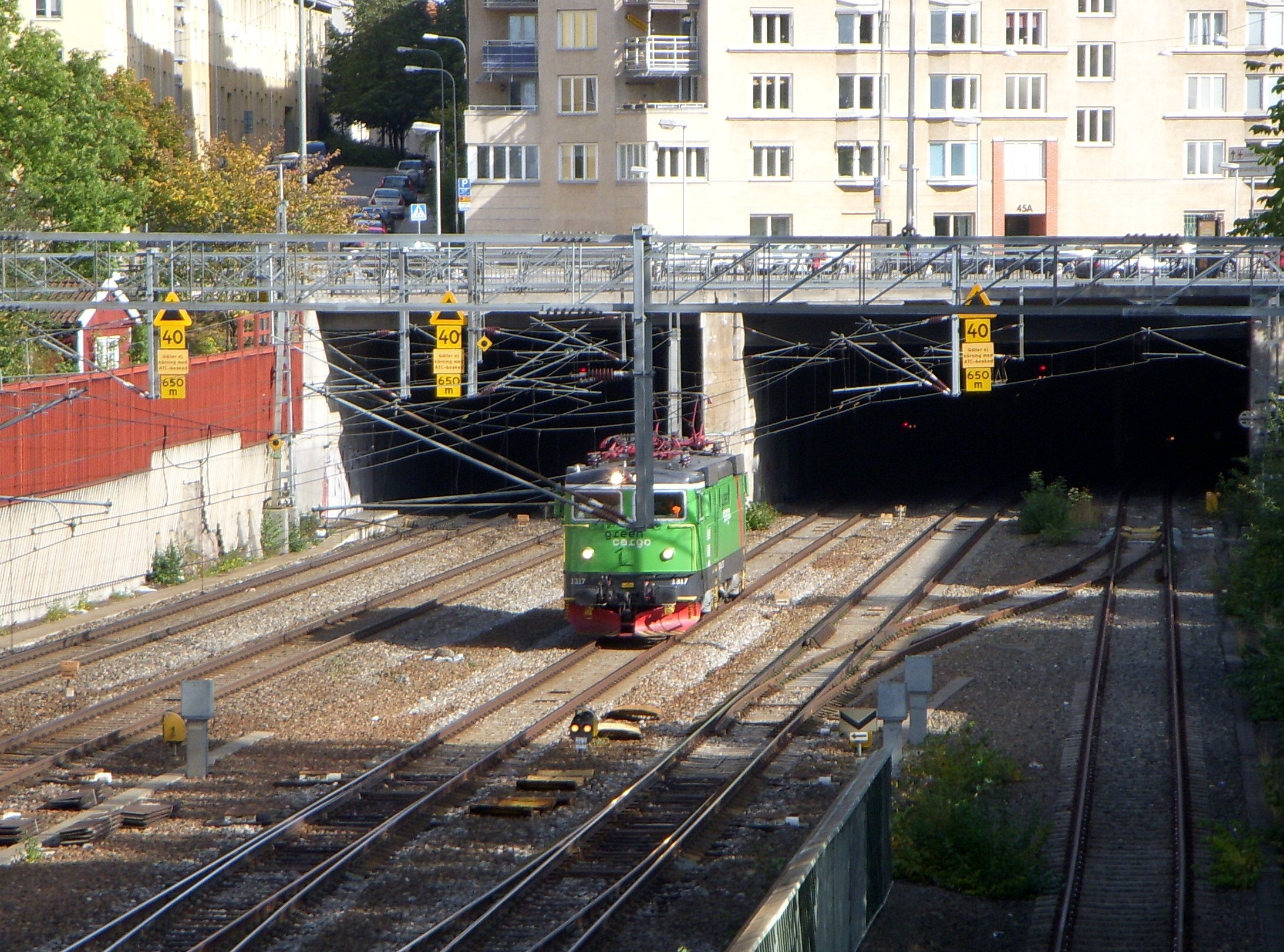 "Green cargo" på väg ut ur Södra tunneln vid Ringvägen, Stockholm